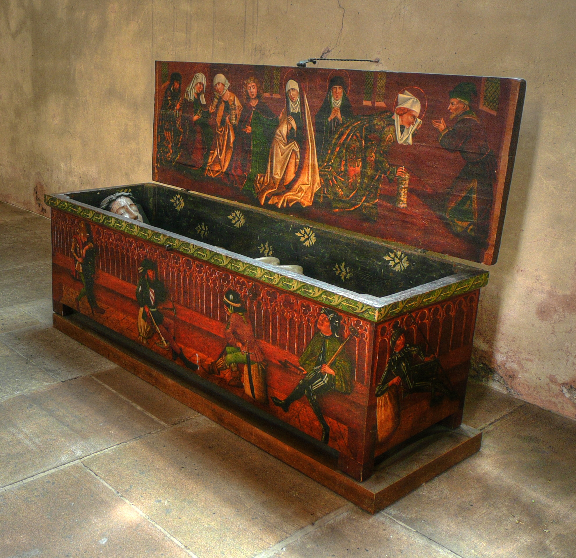 "Heiliges Grab" Erfurter Dom